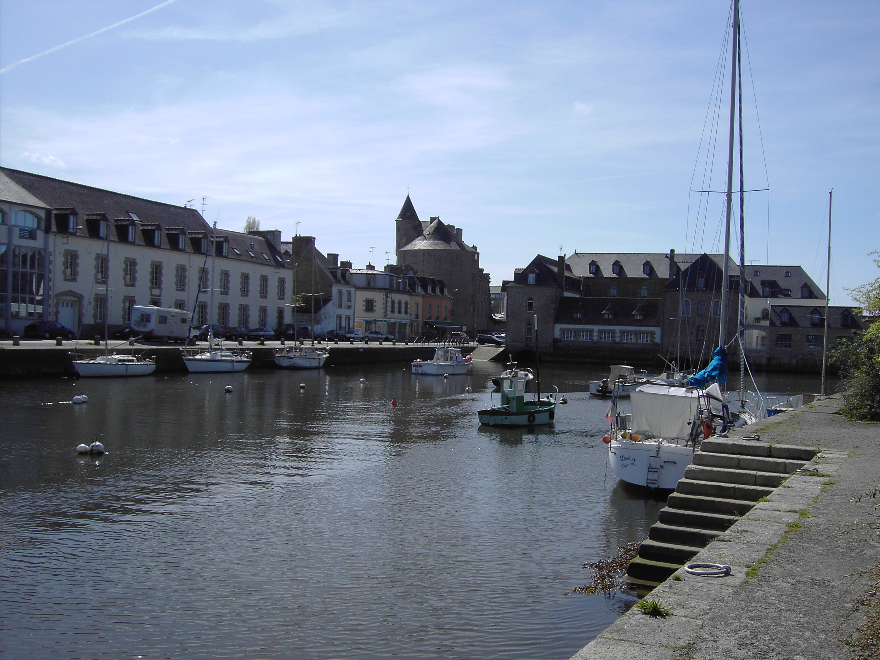 Port de Pont l'abbé (Finistère)